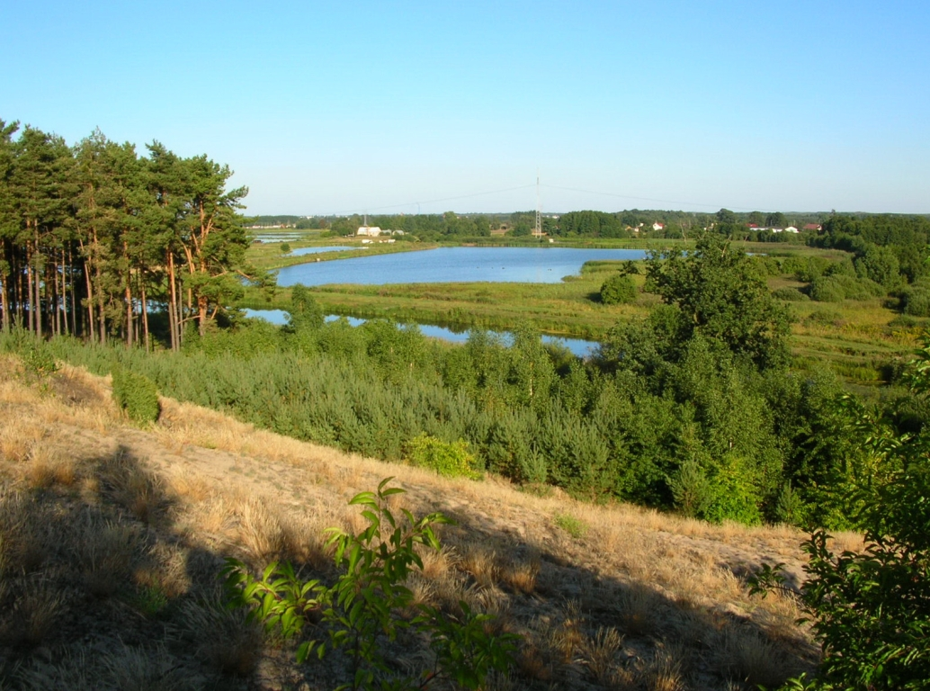 Dolina Łęgnowska. Widok z wydmy śródlądowej na nizinę w okolicy Makowisk